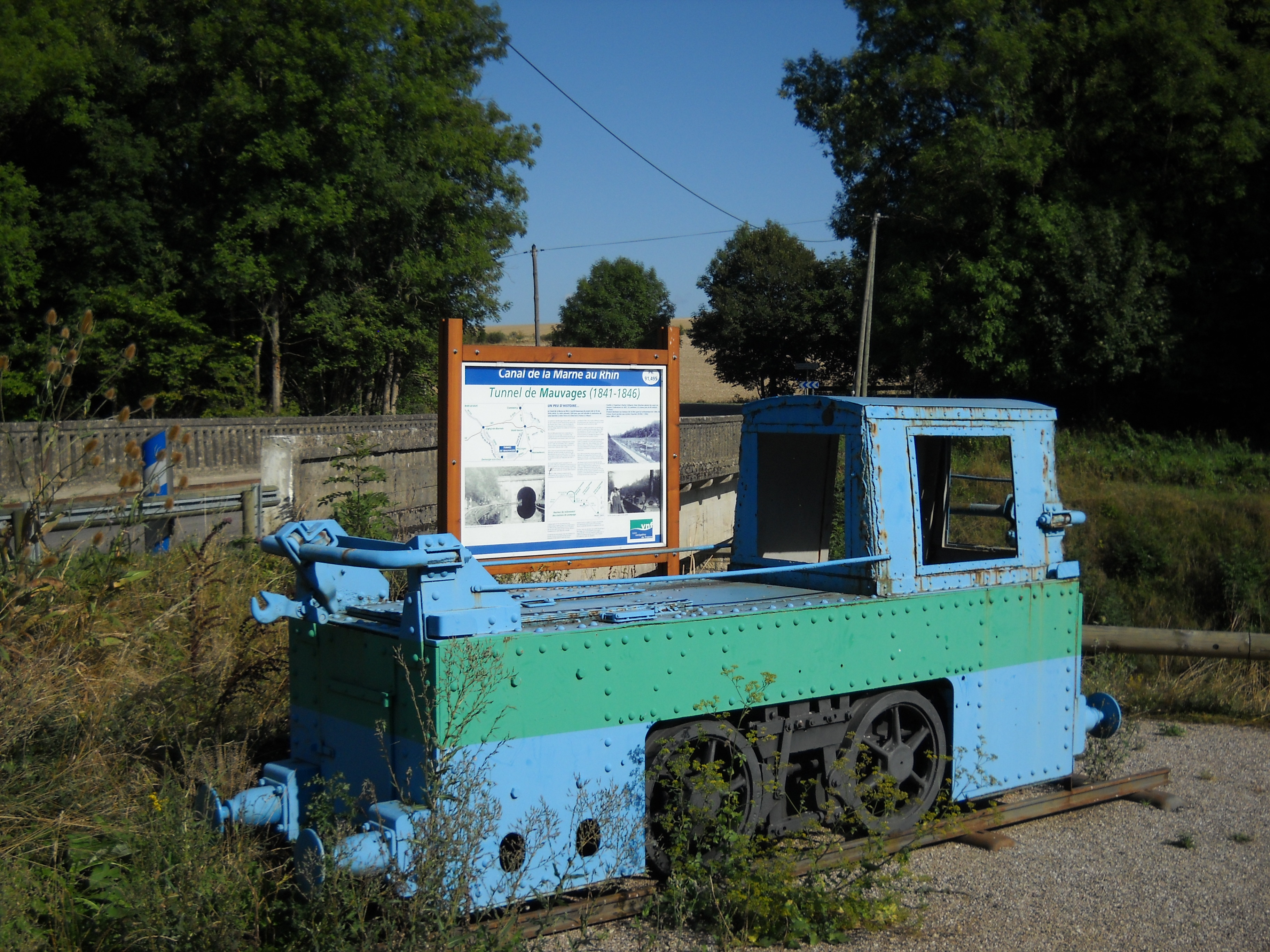 Memorial du canal de la Marne au Rhin